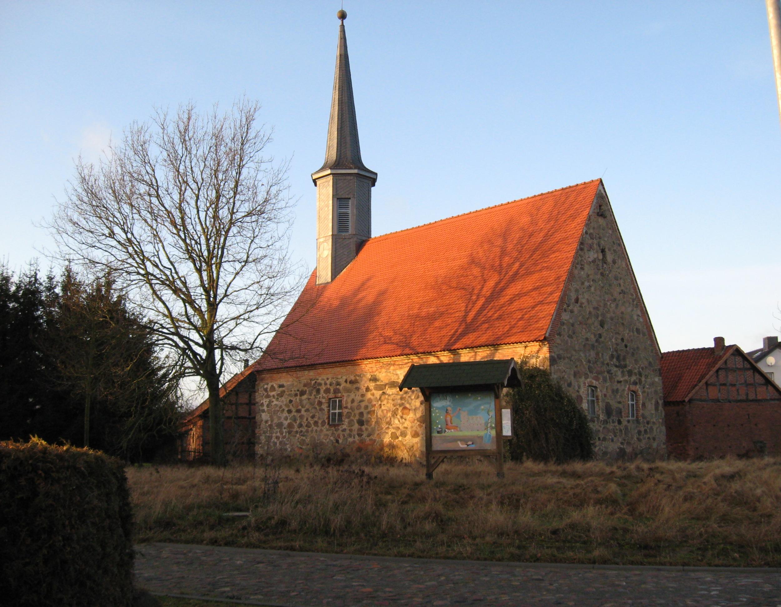 Seebenau